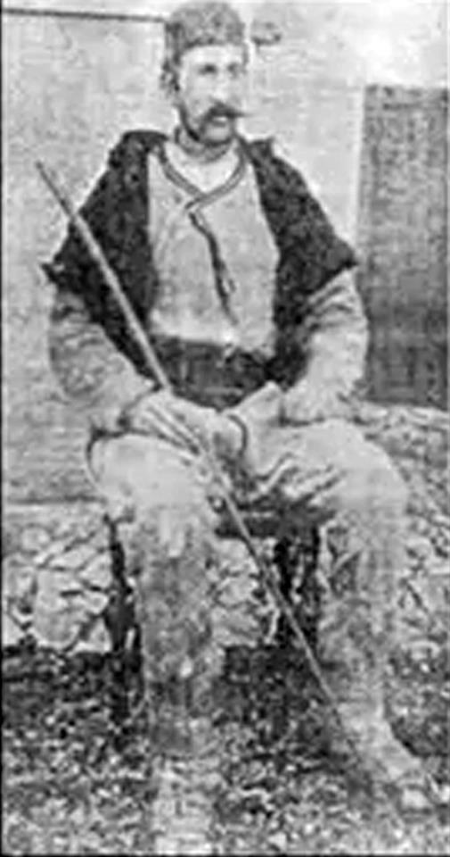 Панта Радосавлевич Дунавски